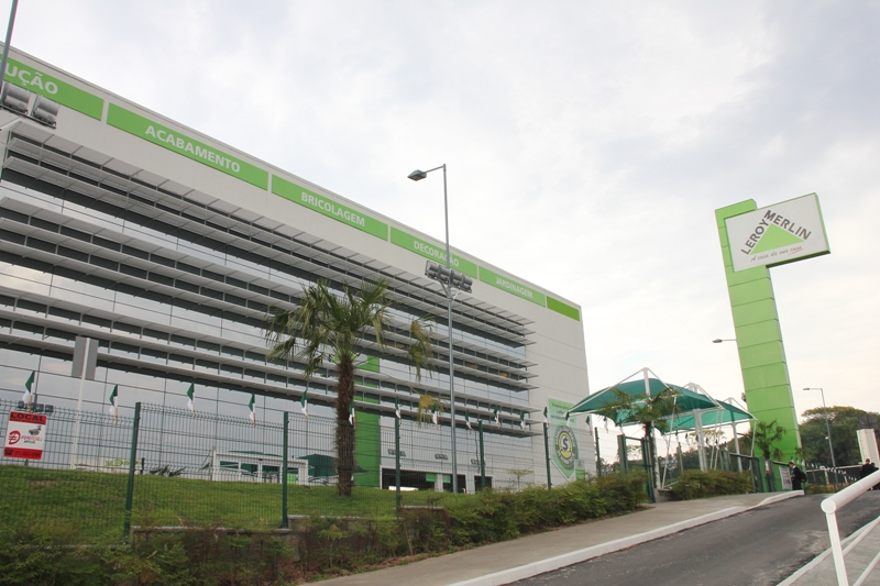 Loja da Leroy Merlin Brasil em São Leopoldo, Rio Grande do Sul.